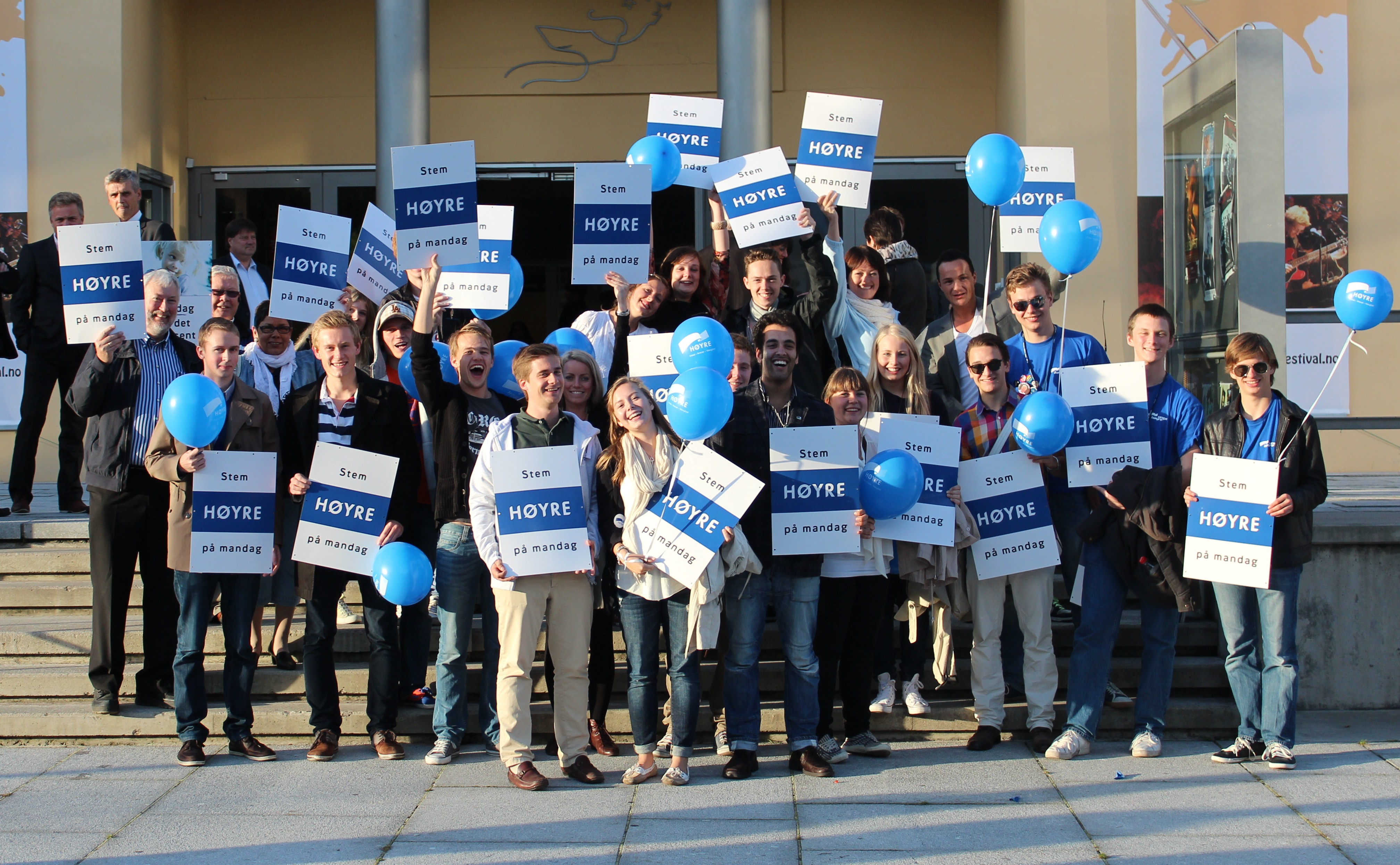 Bilde av Akershus Unge Høyre og lokale høyrepolitikere under valgkampen i 2011. Bildet ble tatt utenfor Lillestrøm Kultursenter i forkant av partilederdebatten.